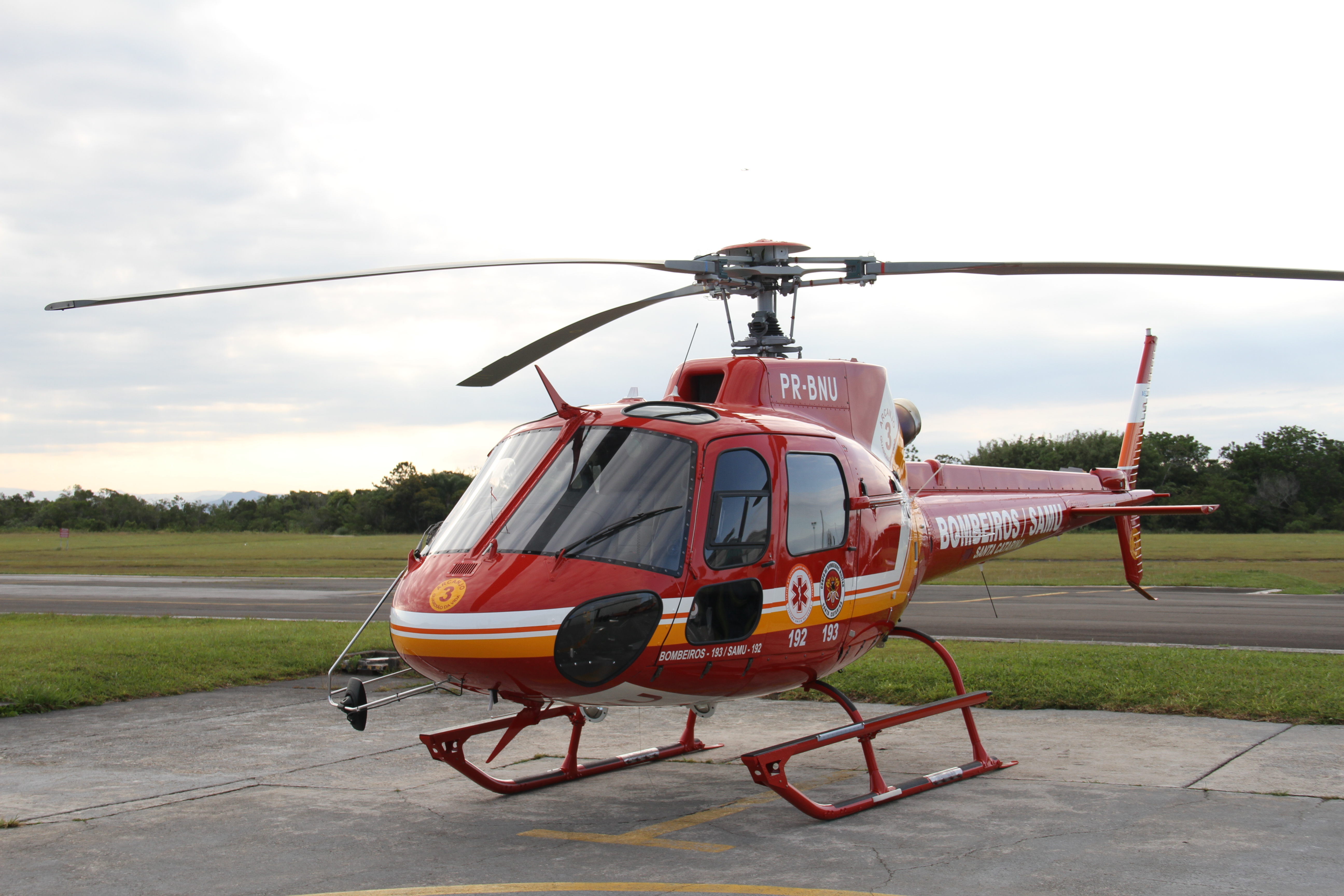 Aeronave Arcanjo 03 do Corpo de Bombeiros Militar de Santa Catarina e Serviço de Atendimento Móvel de Urgência.